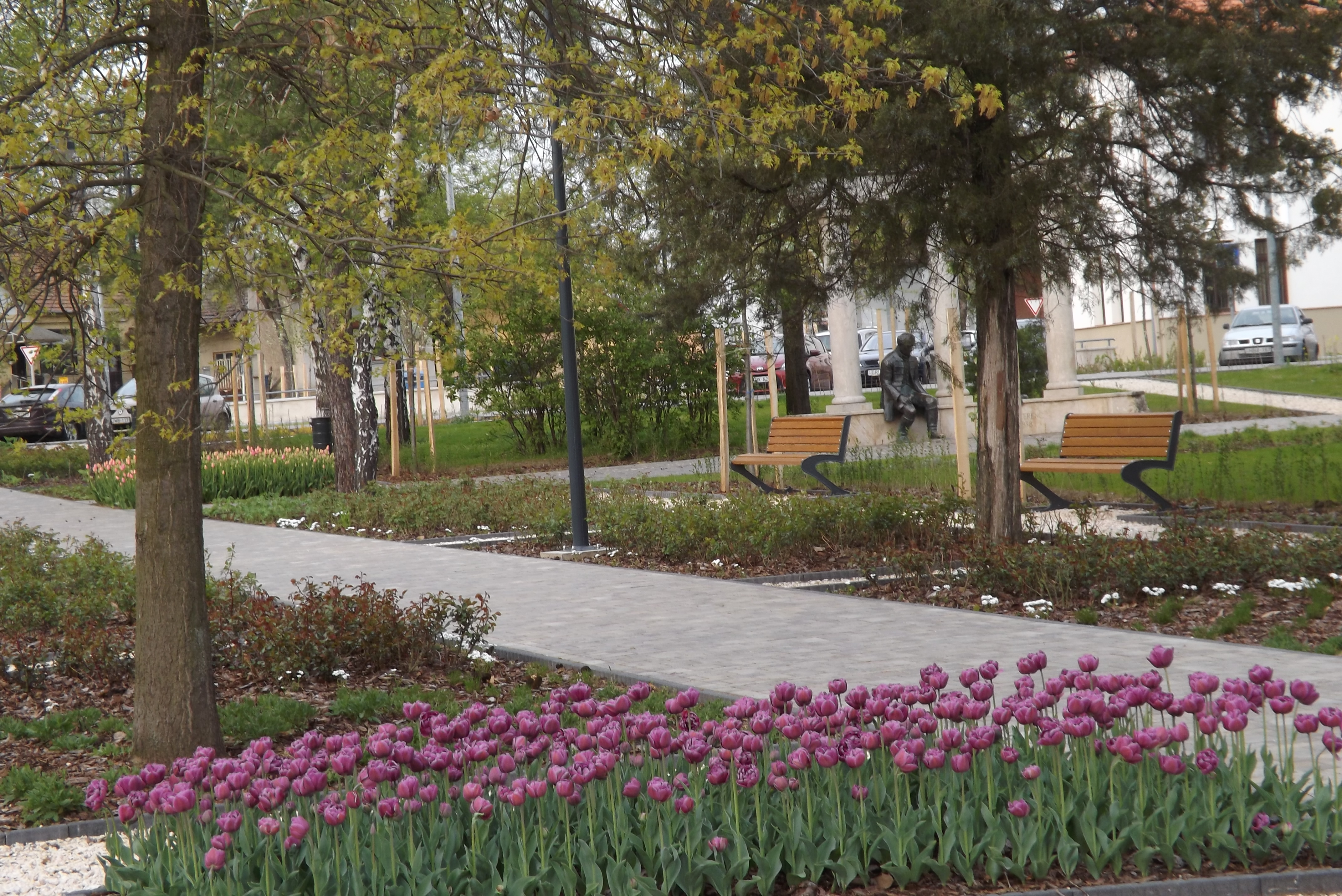 Mátészalkai parkrészlet